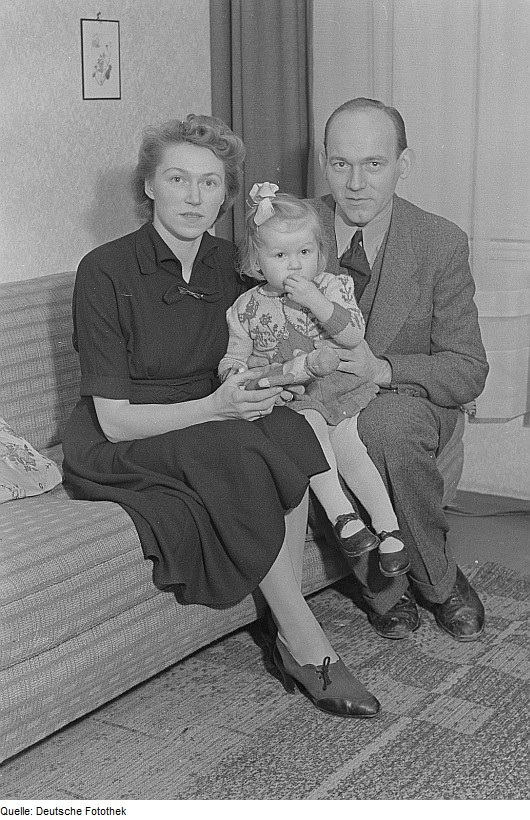 Original image description from the Deutsche Fotothek Portrait einer Familie